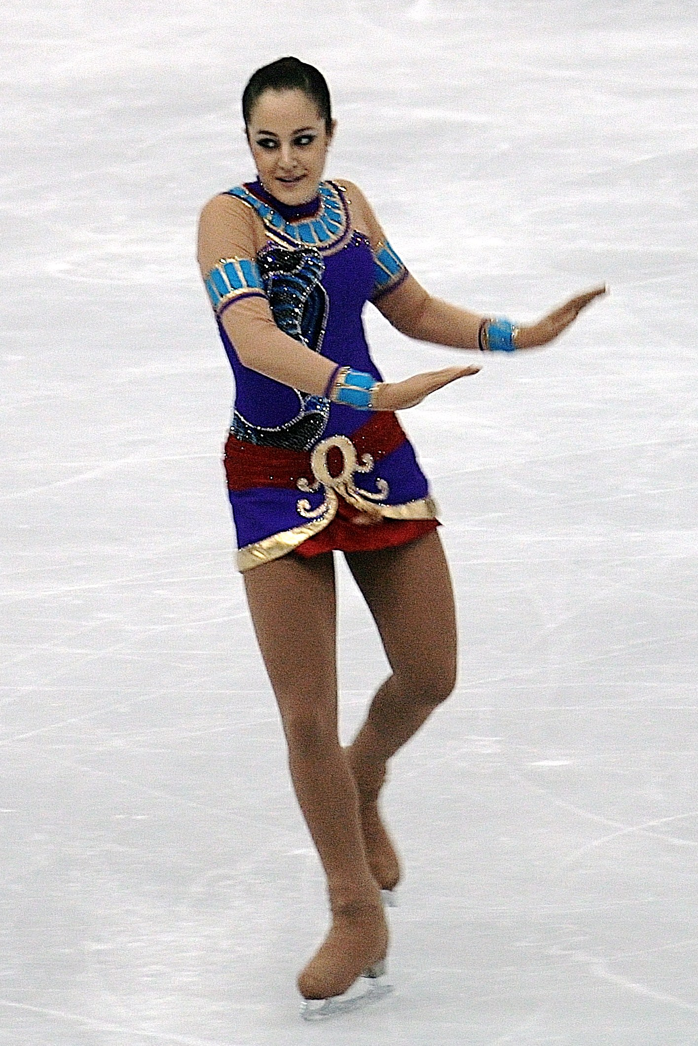 Рейна Амуй (Мексика) на чемпионате мира по фигурному катанию 2012.